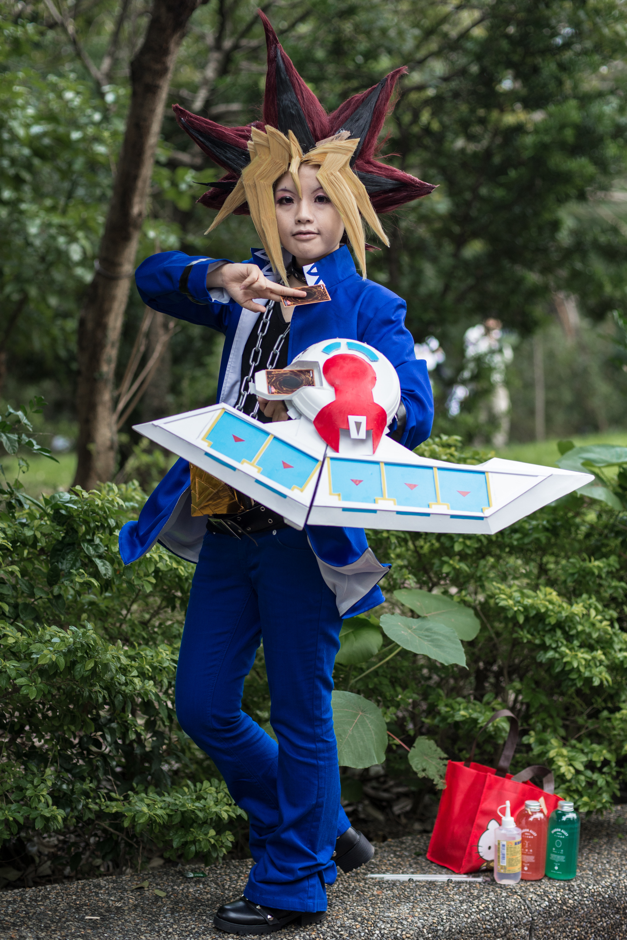 第44屆台灣同人誌販售會，《遊戲王》武藤遊戲cosplayer。